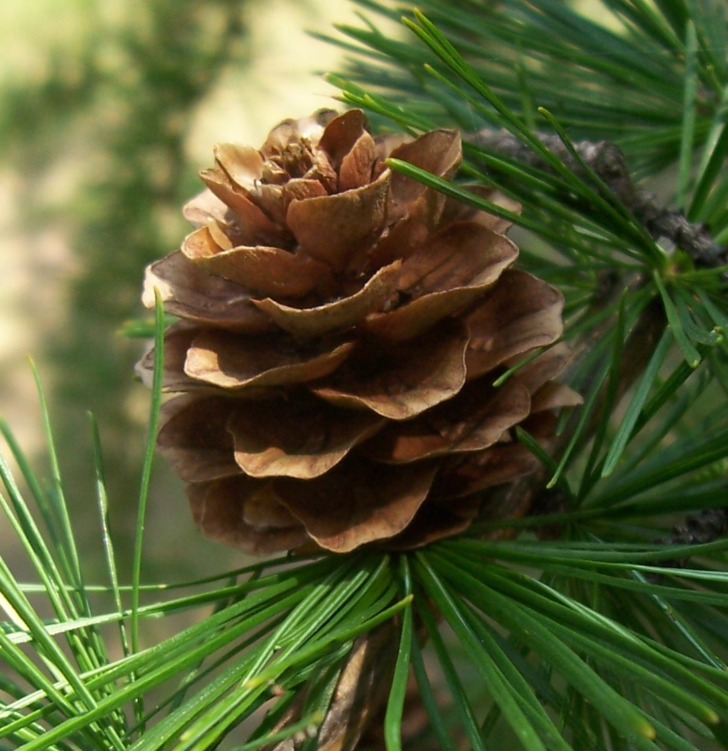 Szyszka modrzewia europejskiego